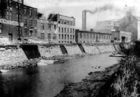 Le Canal Lachine au début de 20ème siècle